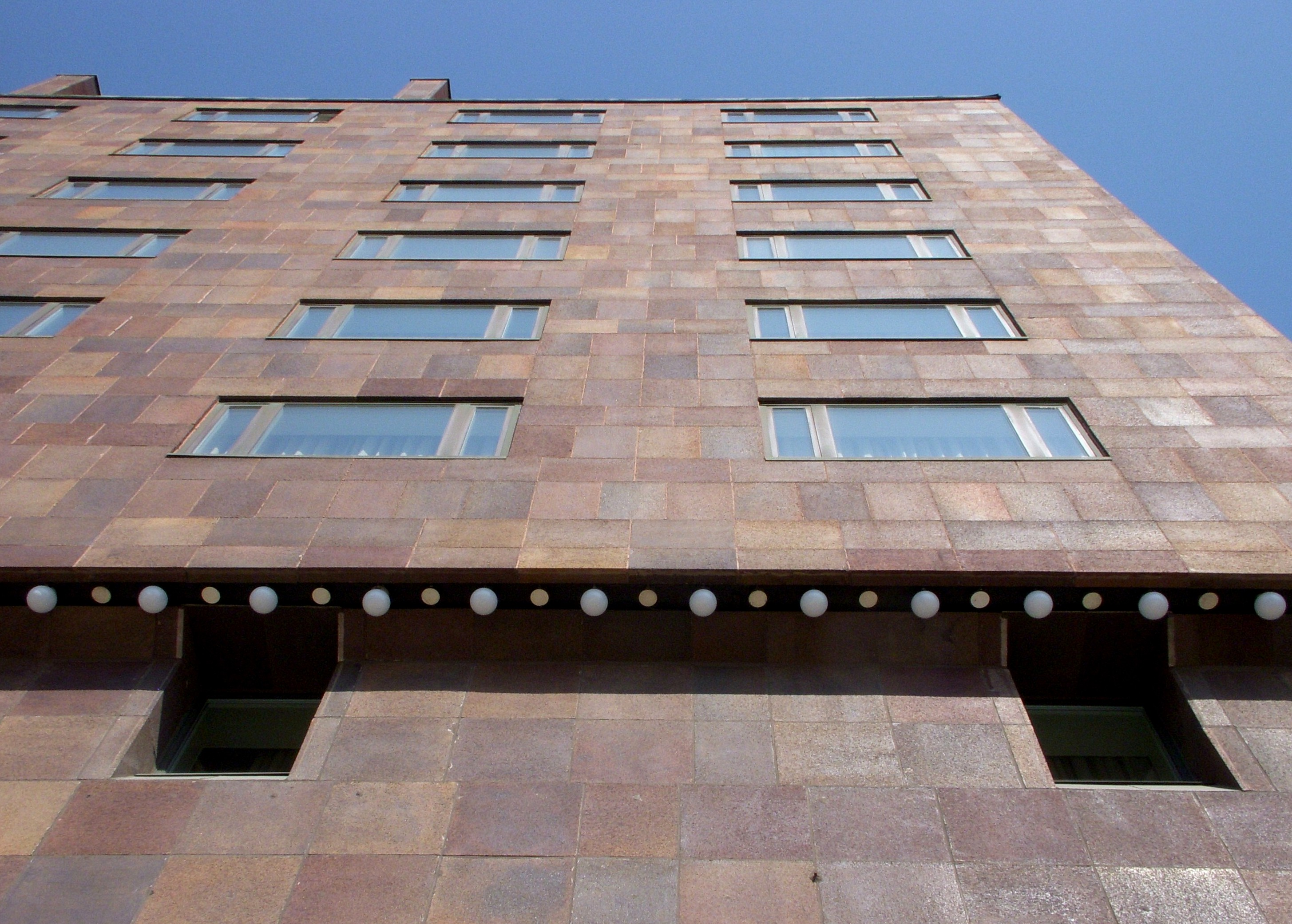 Hotel Sheraton, Stockholm, fasad